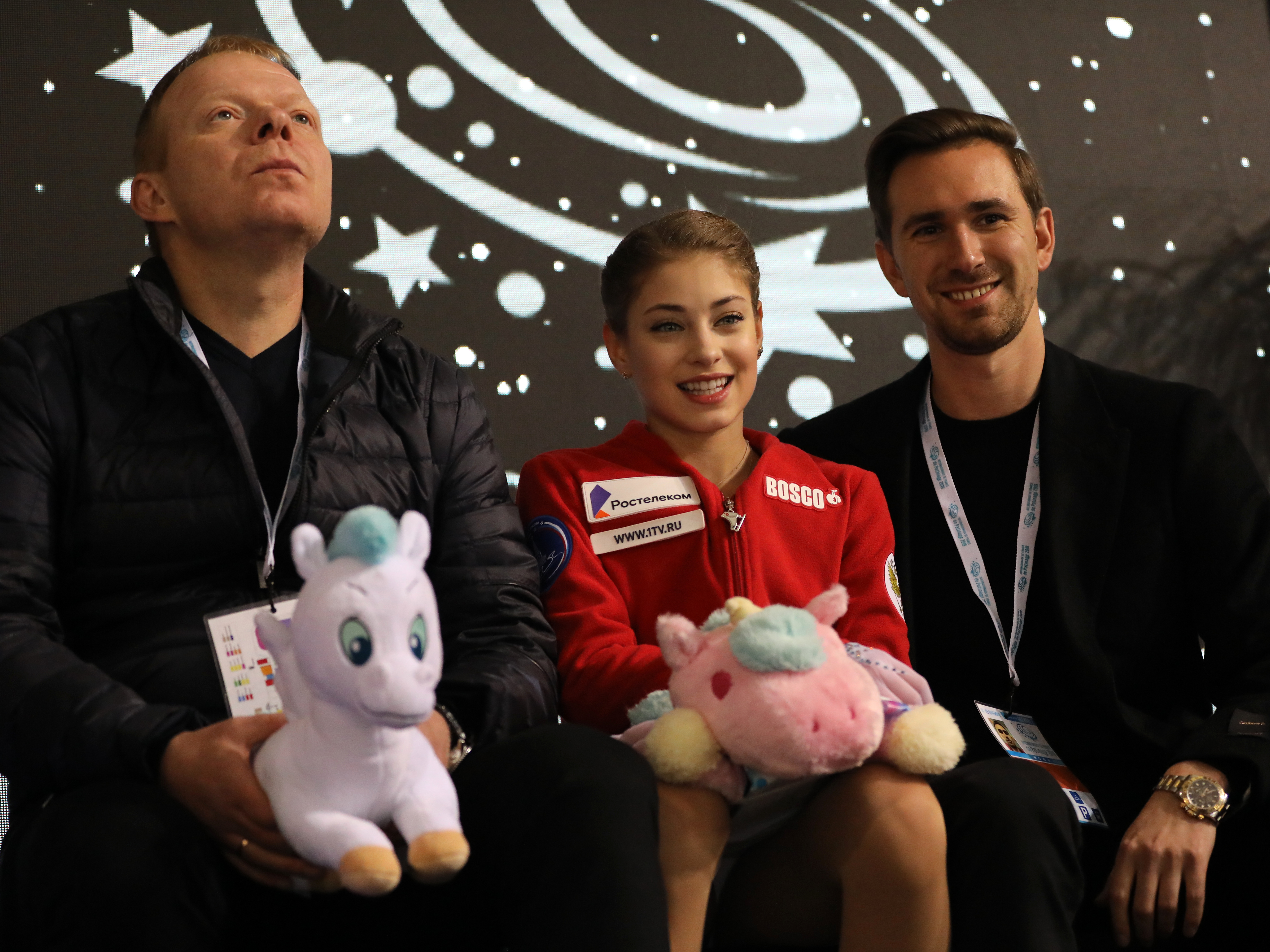 Kiss&cry après le programme court d'Alena Kostornaia aux Internationaux de France 2019.